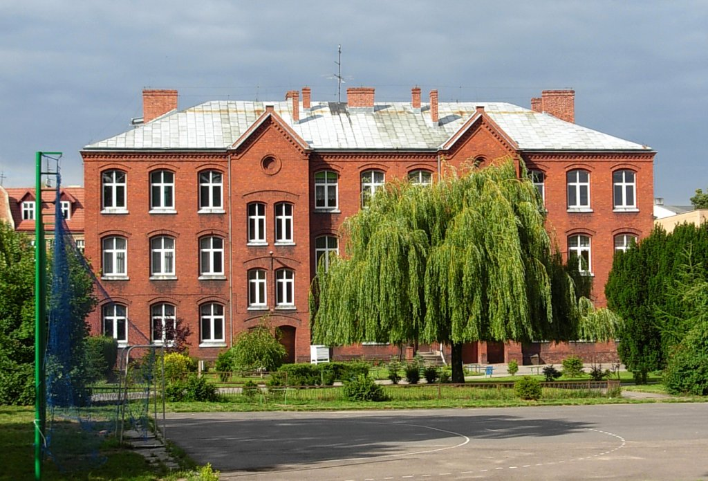 Budynek III LO w Bydgoszczy